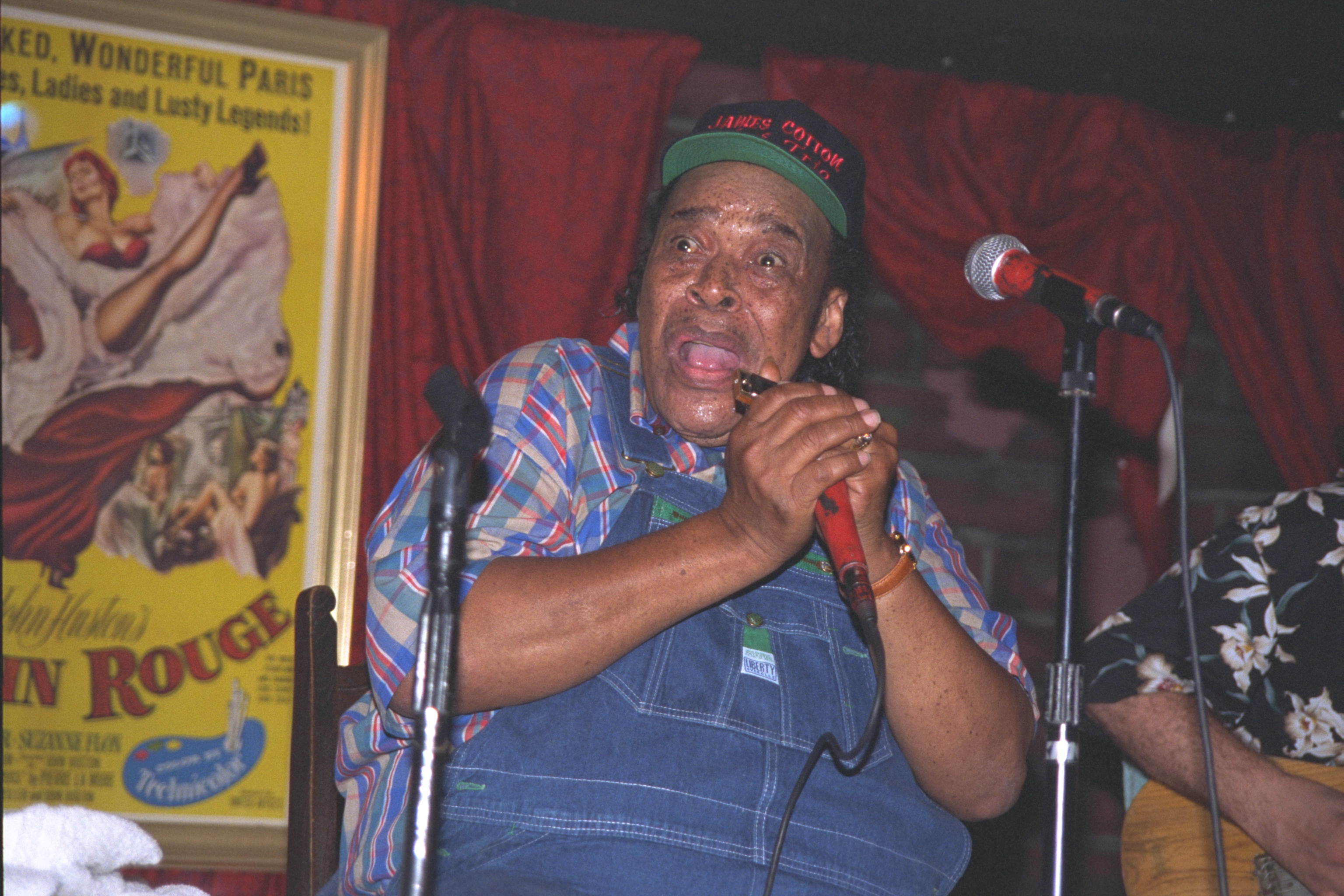 Taken in Delray Beach, FL